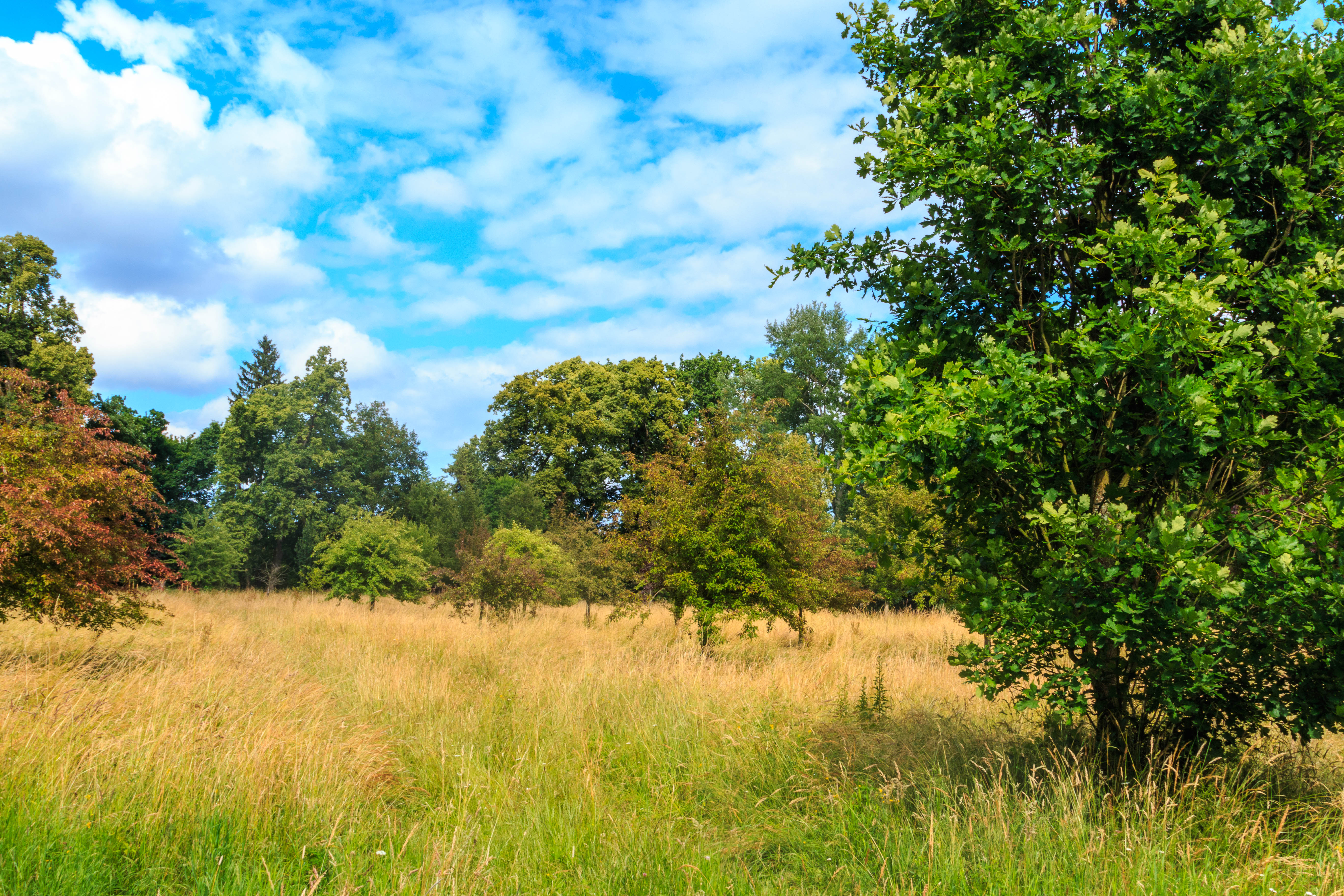 PP Libosad